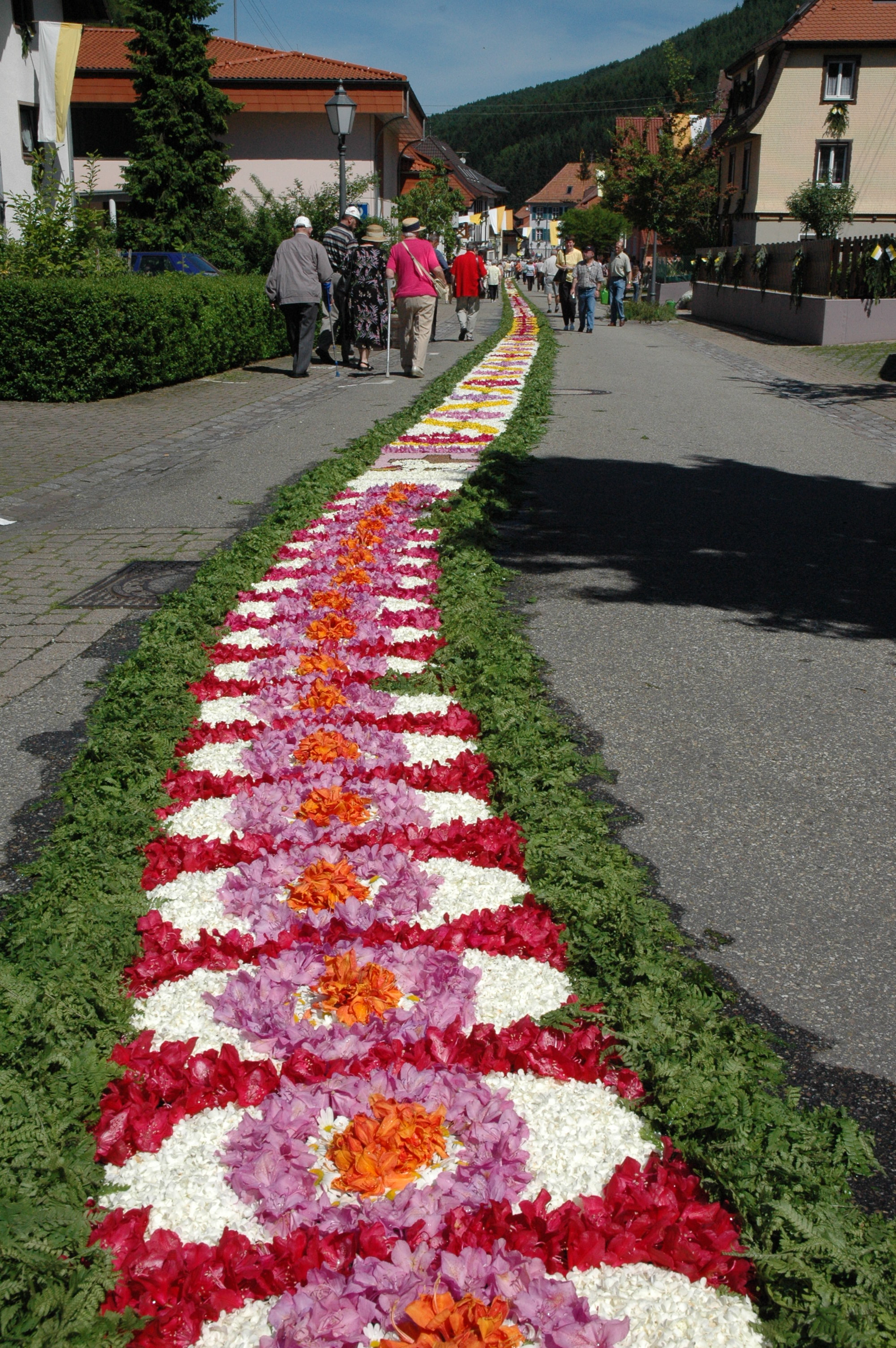 Blumenteppich an Fronleichnam in Mühlenbach (Baden).